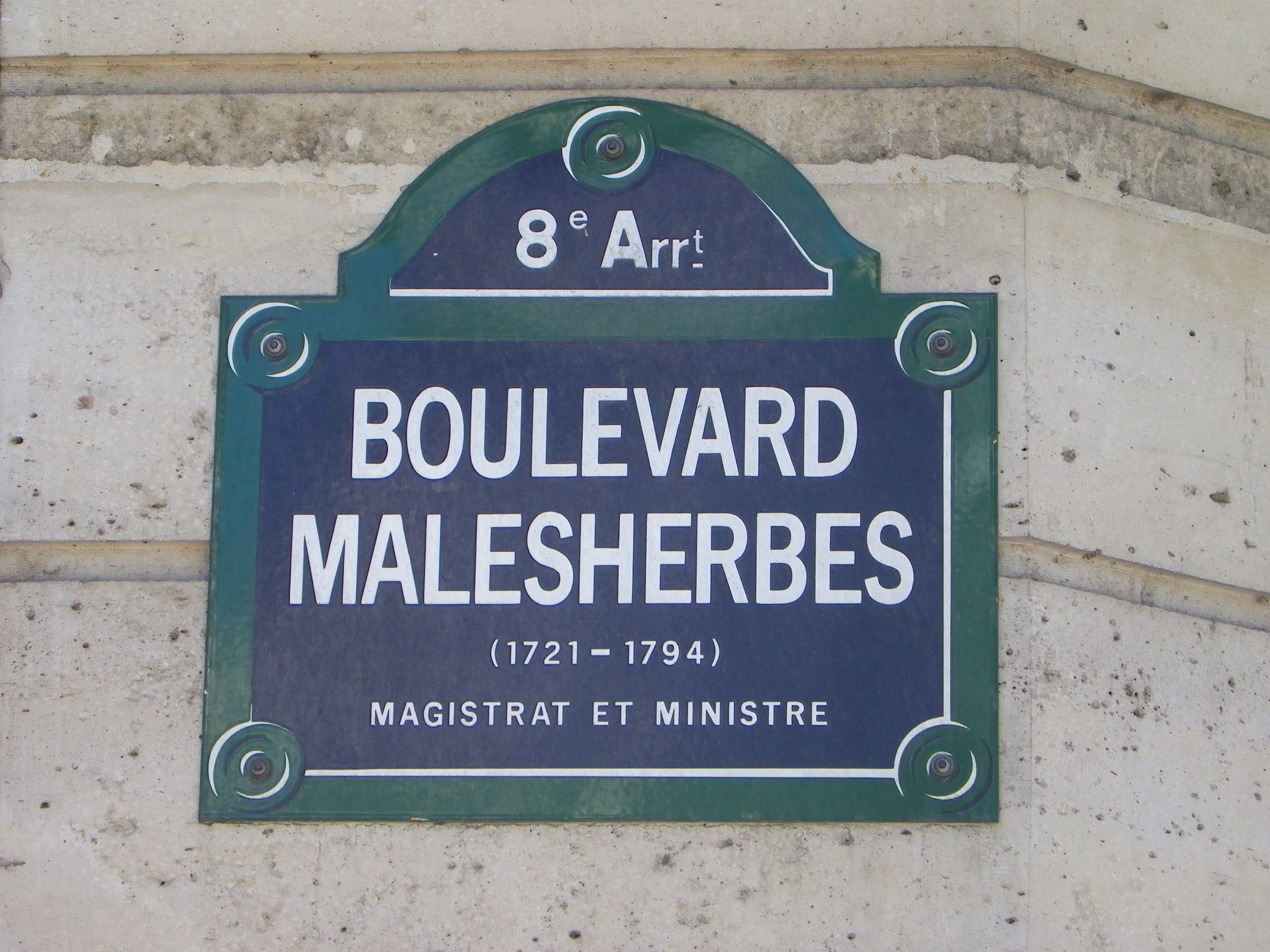 Plaque boulevard Malesherbes à Paris